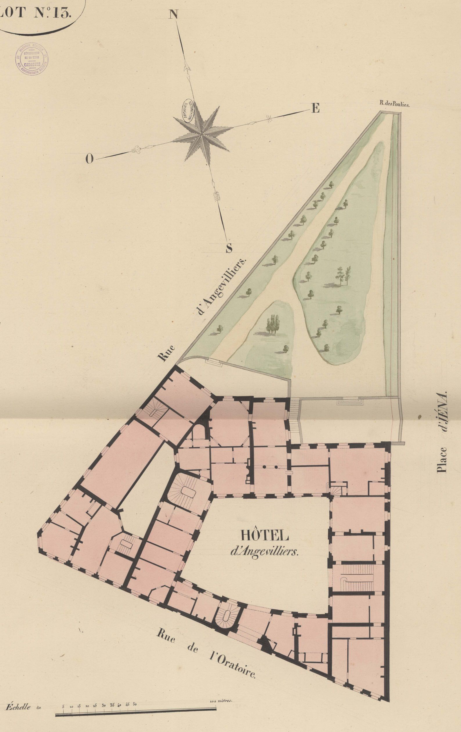 Cadastre de Paris par îlot (1810-1836), plan du 13e quartier (Saint-Honoré), îlot 13, (F/31/79/36) rogné. Hôtel d'Angiviller, construit dans les années 1740 face au Louvre. Mairie du 4e arrondissement de Paris de 1850 à 1854.